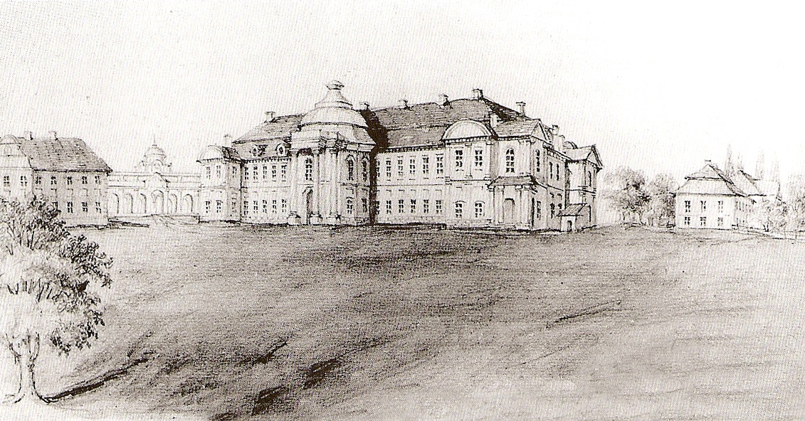 Вид на палац.